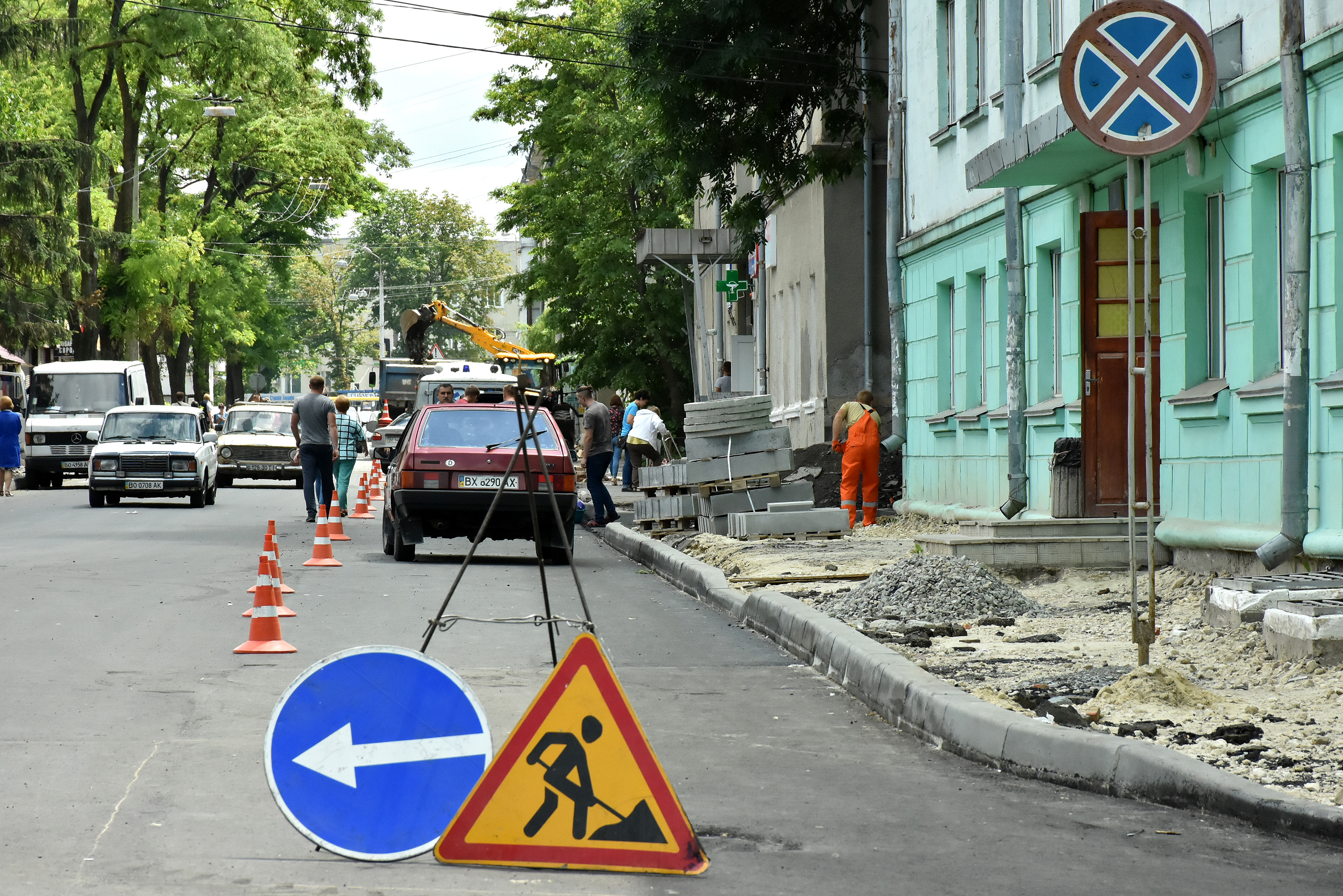 Ремонт вулиці Клінічної в Тернополі.